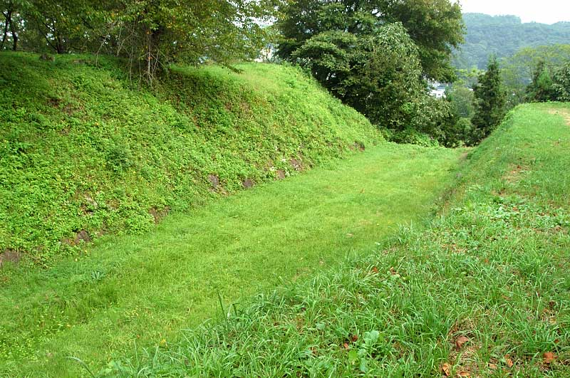 九戸城の堀。Kunohe Castle, Ninohe, Iwate, Japan 平成17年9月19日、投稿者本人が撮影。